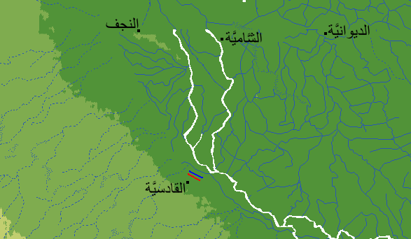 موقع معركة القادسية، حيث يظهر في الخريطة جيش المسلمين بالأحمر مقابل الجيش الساساني بالأزرق.